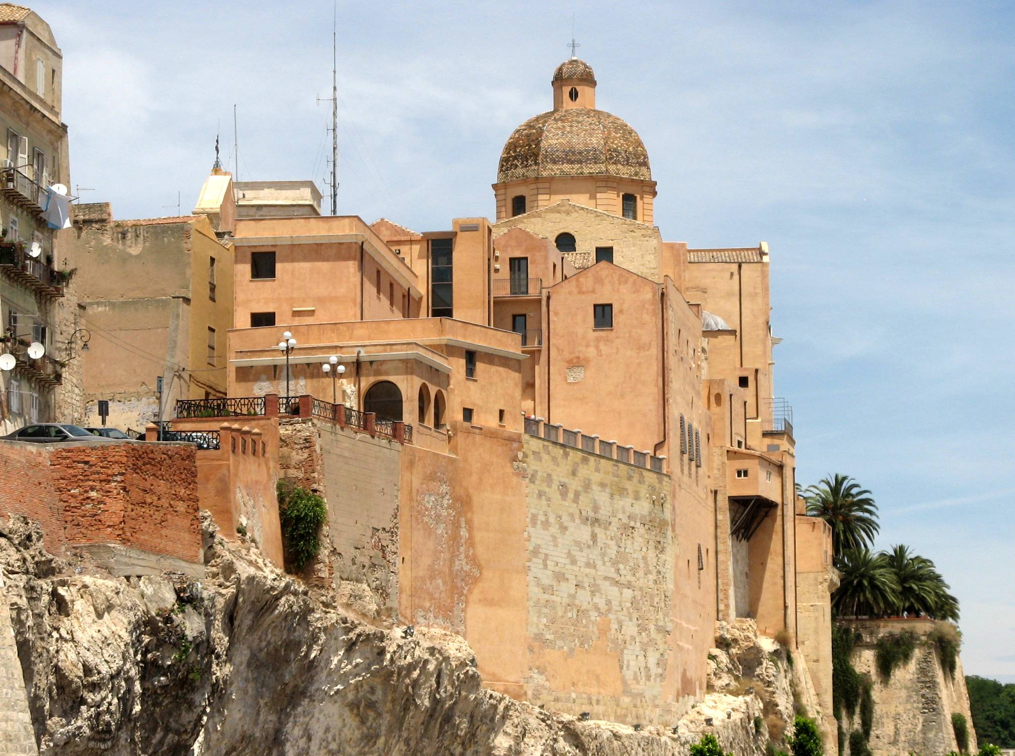 Taken in Cagliari, Sardinia, in June 2007